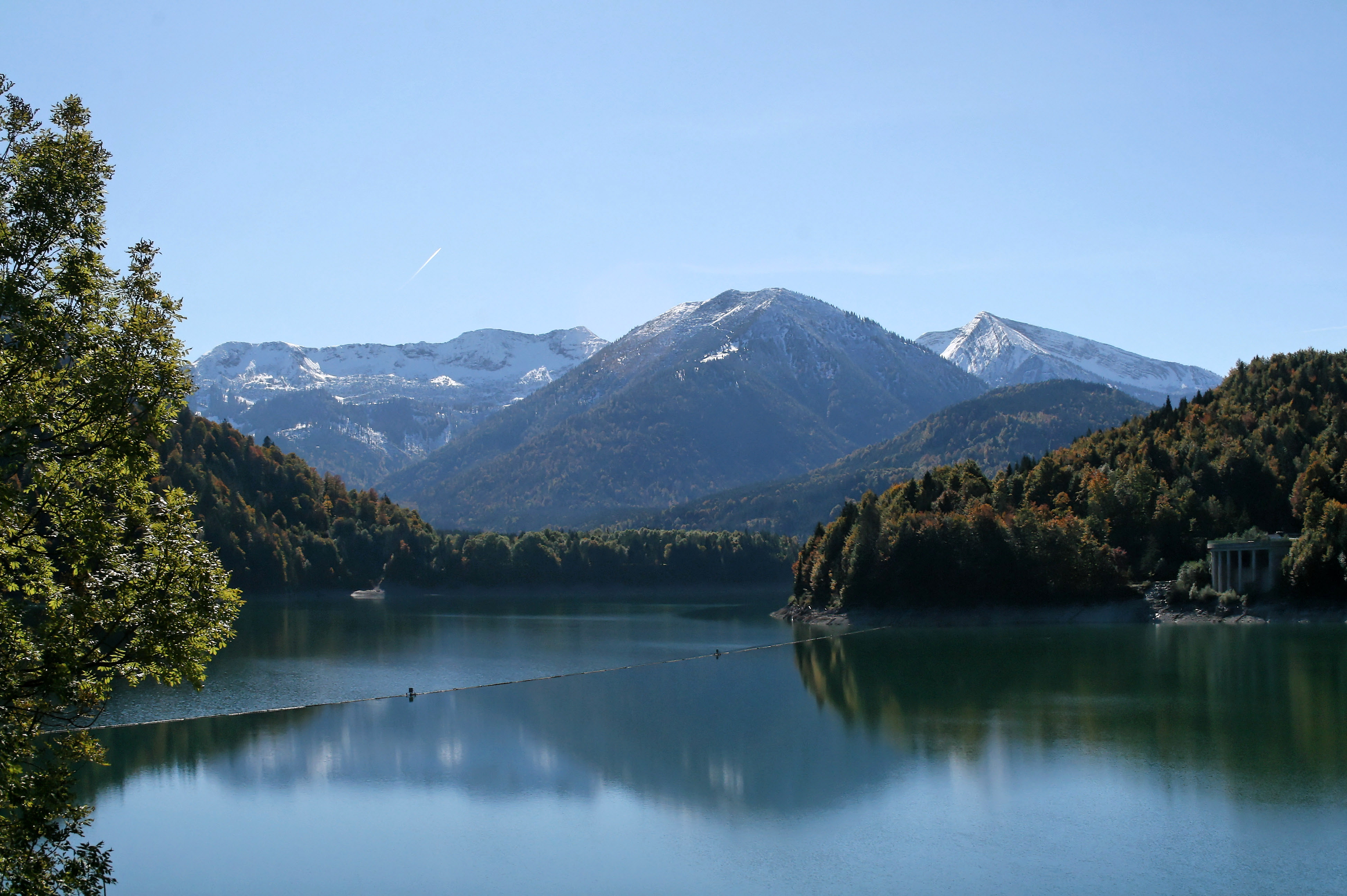 Sylvensteinstausee